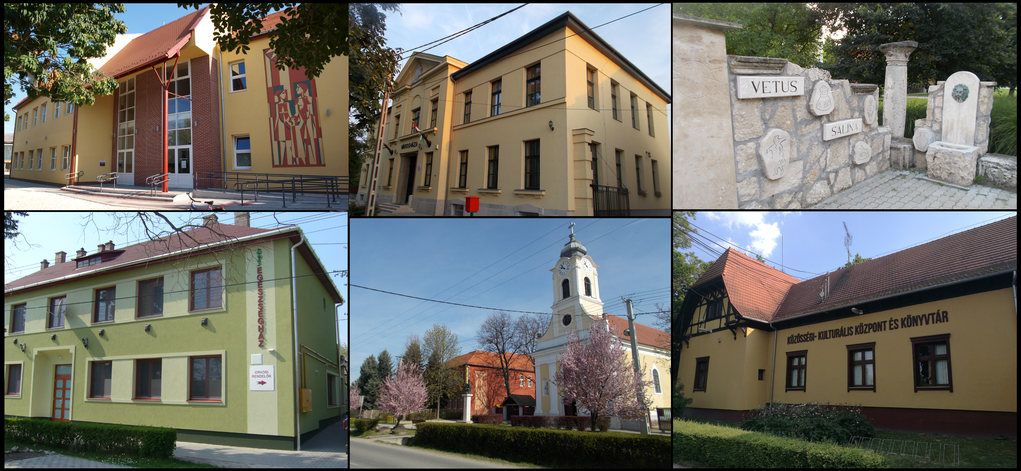 Adony fő épületei.